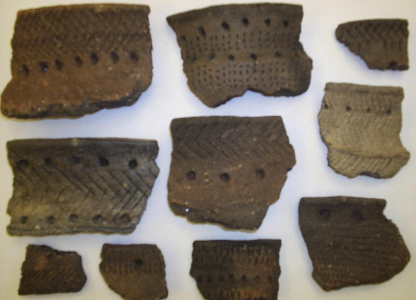 Gropkeramik, boplatsfynd från Grammahagen i Mjällby socken i Blekinge, fotograferad den 18 oktober 2005 av Harri Blomberg.